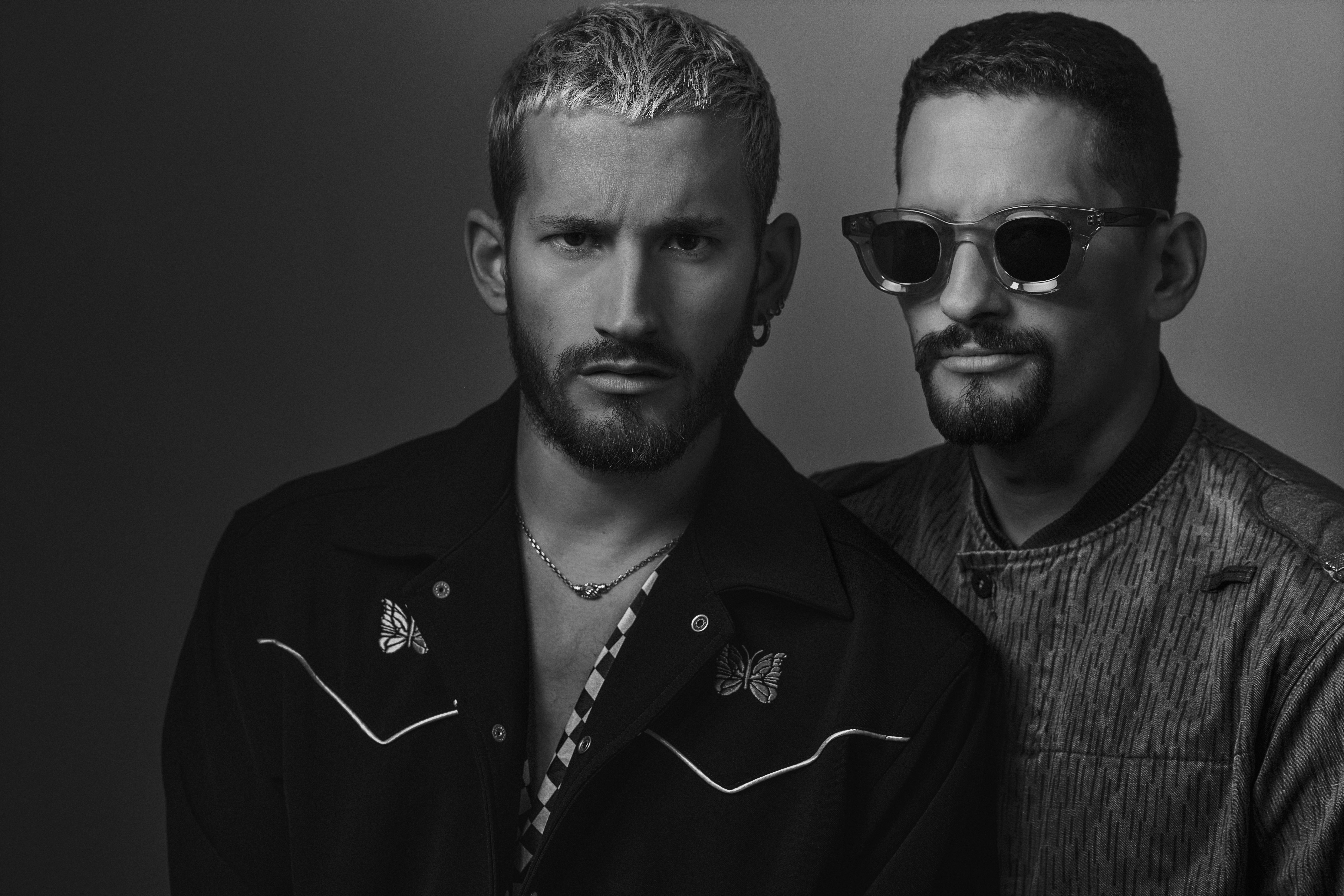 Mau & Ricky durante su sesión de fotos promocional